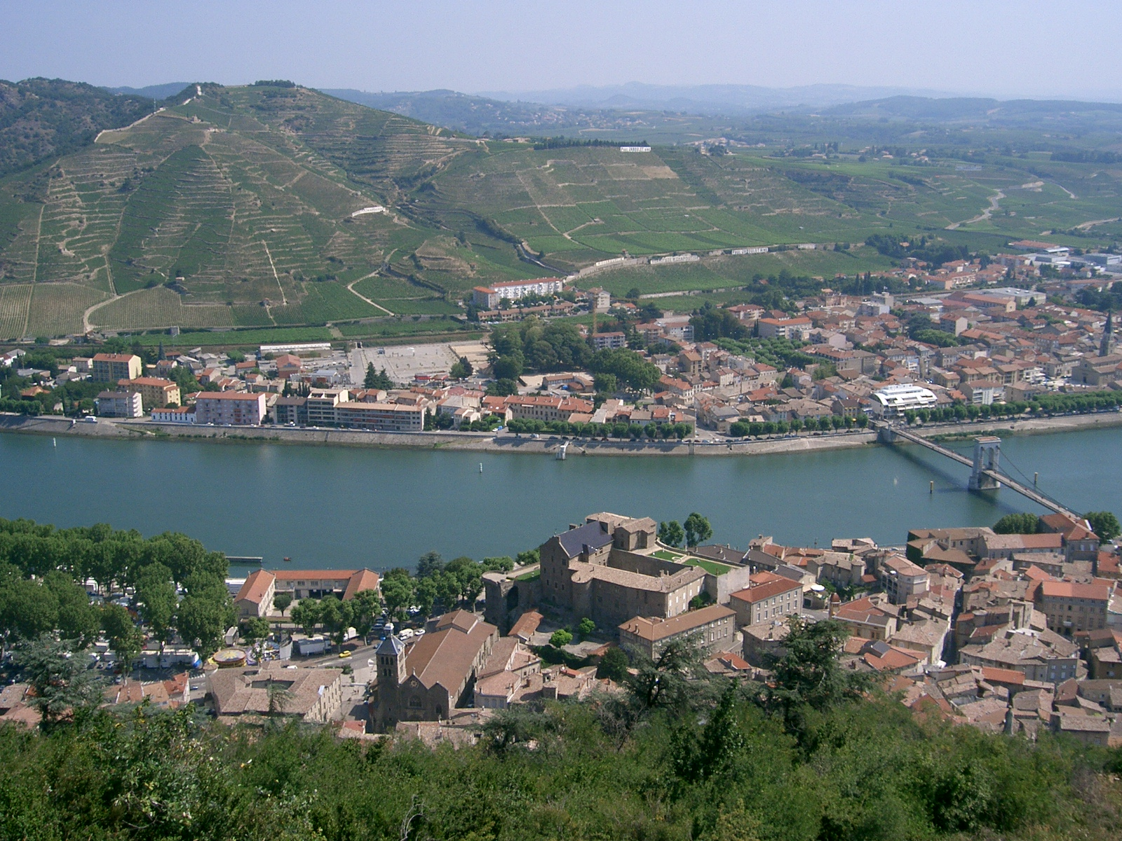 Tournon-sur-Rhône et, en face, Tain l'Hermitage et son vignoble de Côtes-du-Rhône. self made PRA